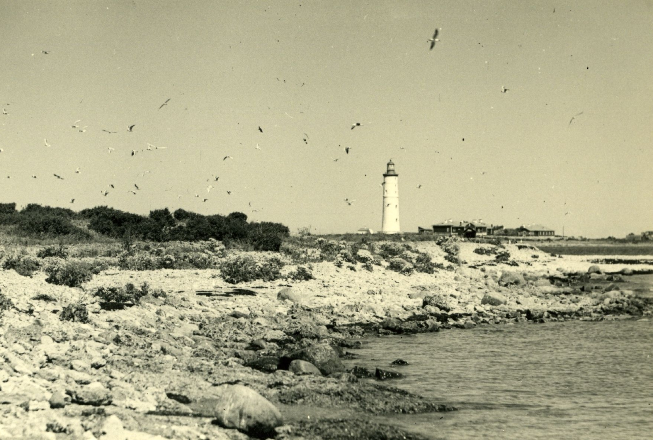 Kivine rand Alumisel Vaikal, taustel Vilsandi saar.